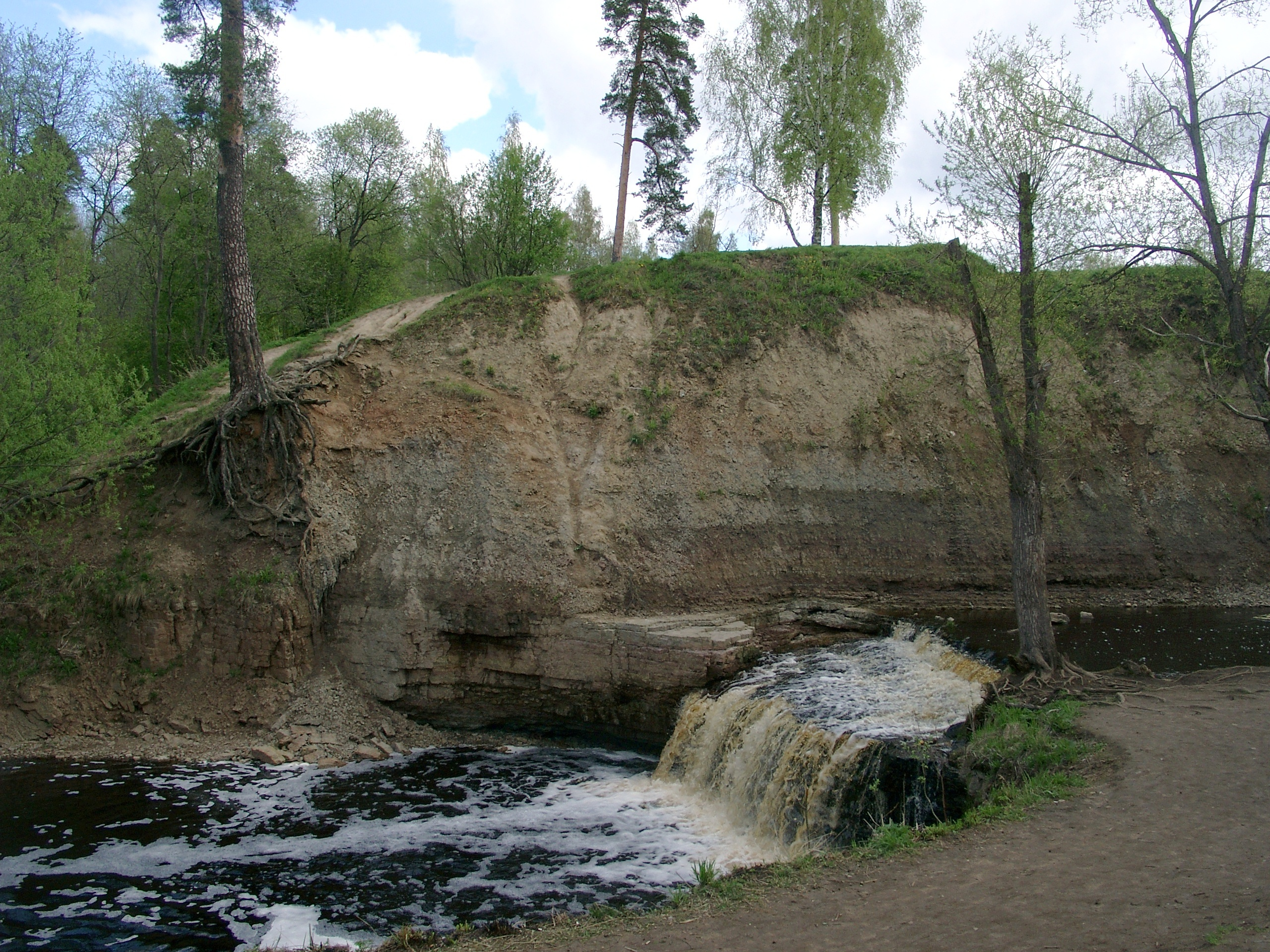 Водопад на реке Саблинка, Тосненский район Ленинградской области.(The river Sablinka in the Leningrad region)